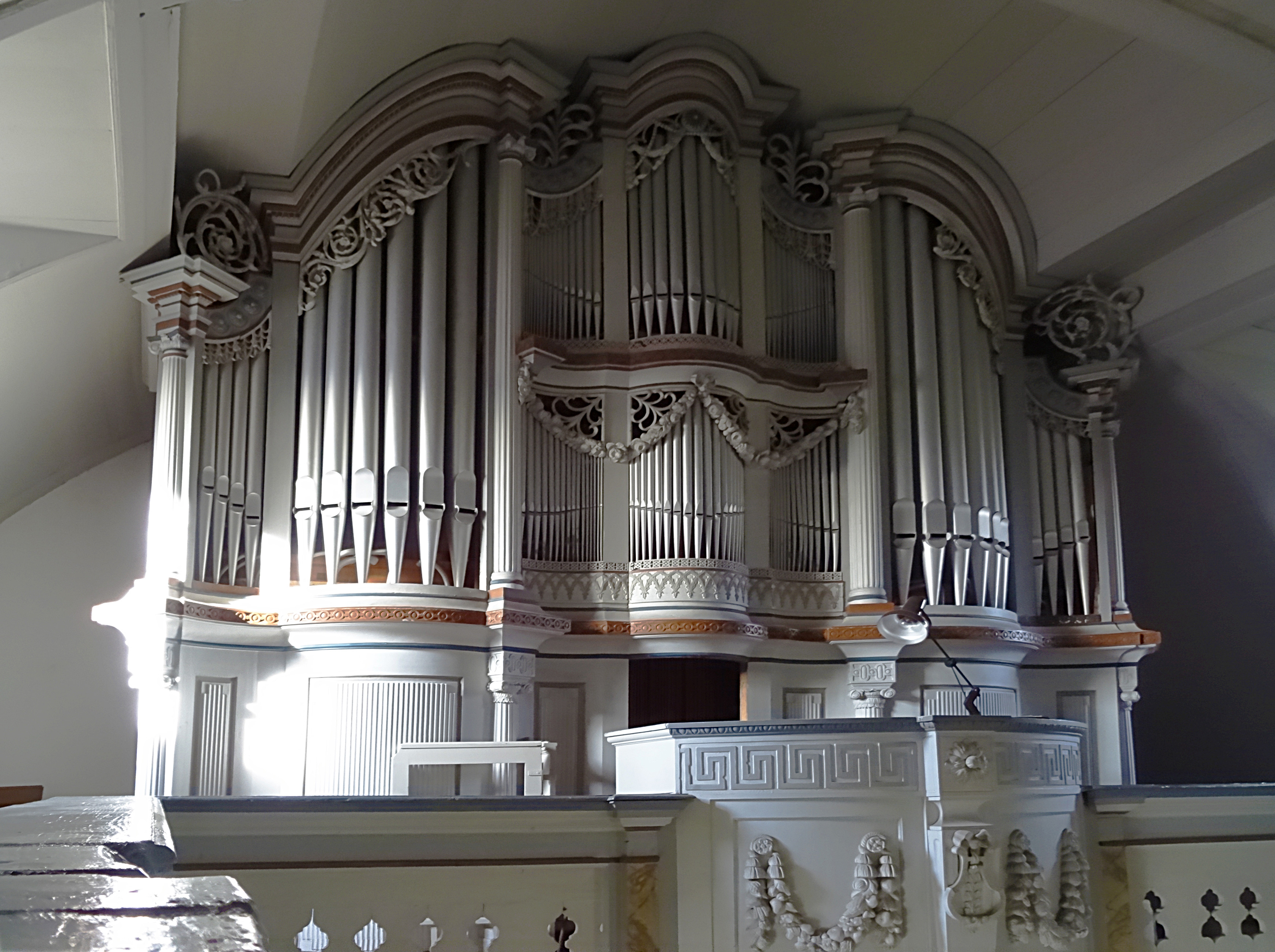 Orgel von Johann Benjamin Witzmann (1807, IIP/23) in St. Georg Mellingen